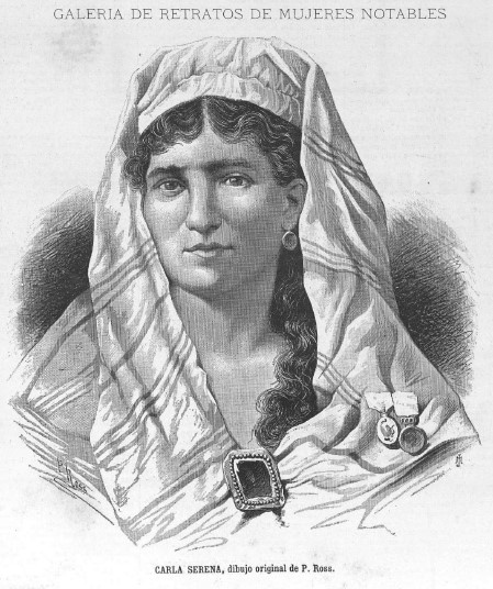 Retrato de Carla Serena, en La Ilustración de la Mujer.